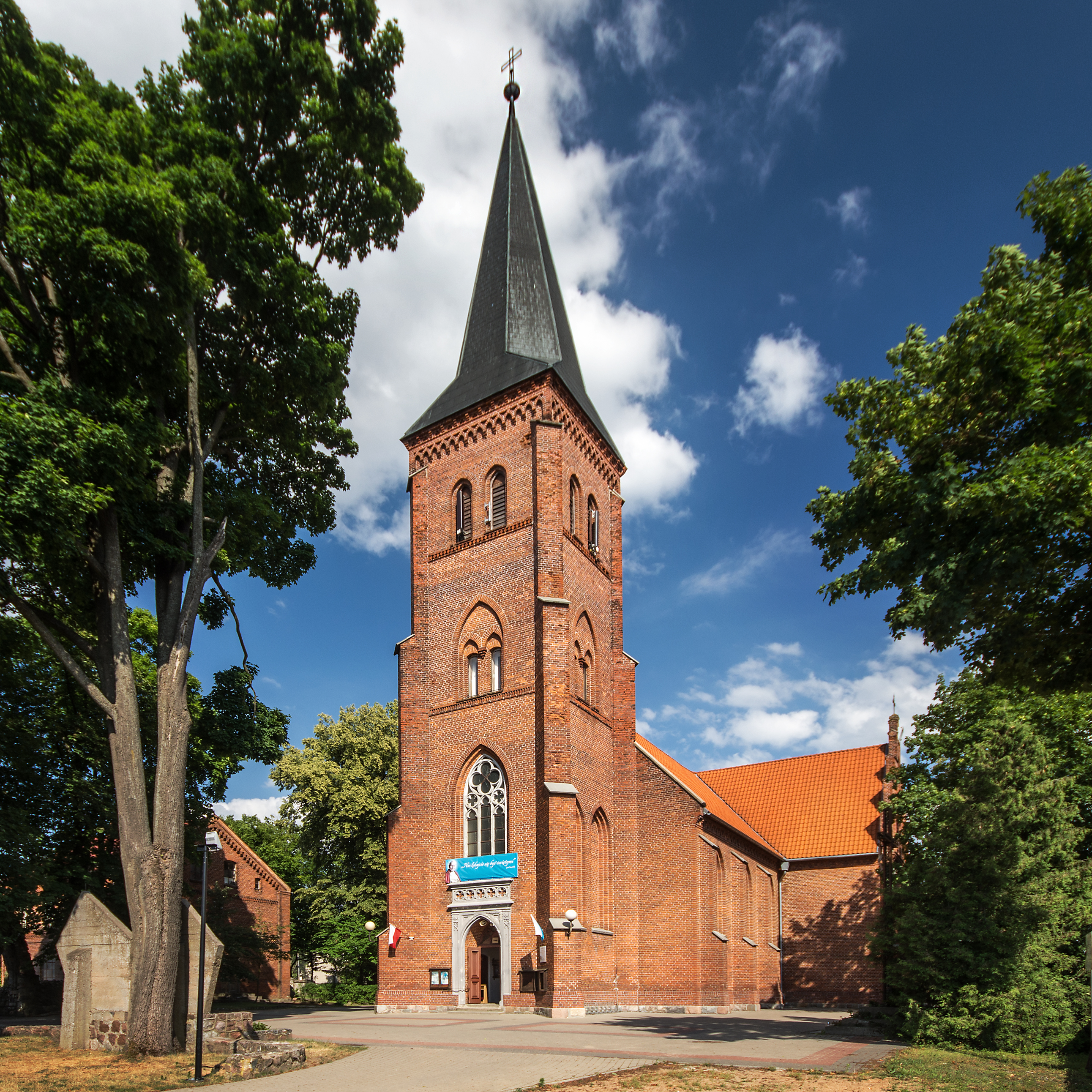 Olsztynek, kościół par. pw. Najświętszego Serca Pana Jezusa, 1888